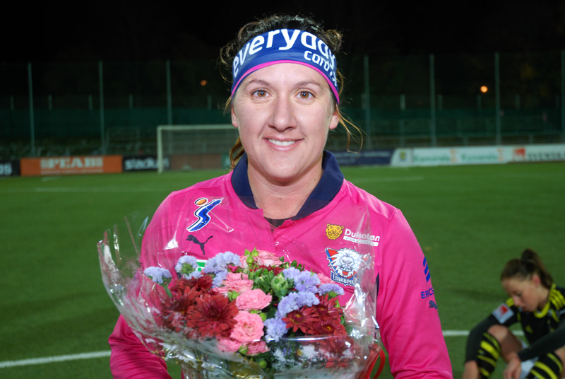 a_52_0100